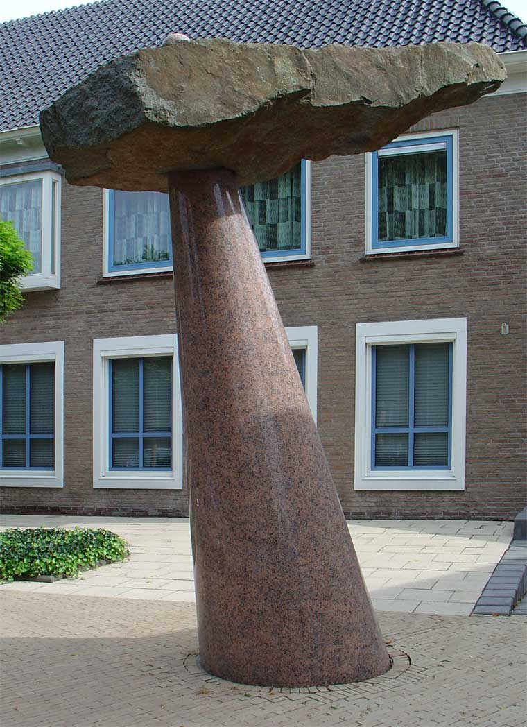 "Kegel met kei" door Rob Schreefel - Borger